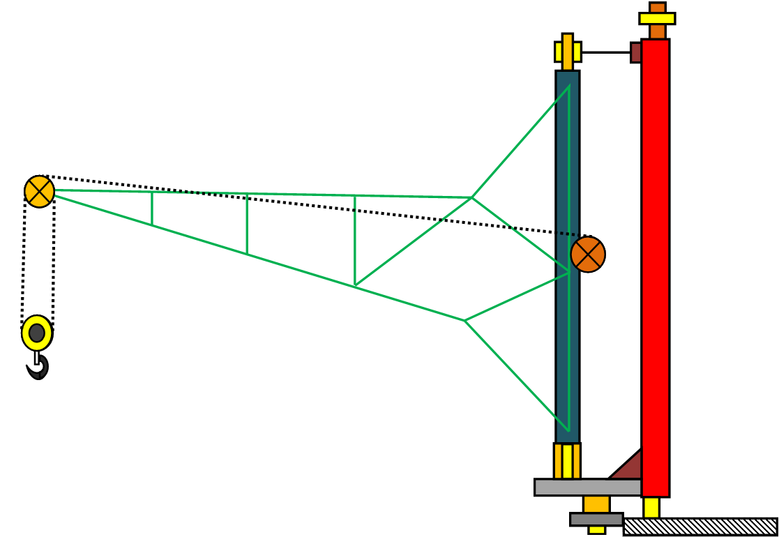 Консольный передвижной кран - с поворотной консолью - мой чертёж